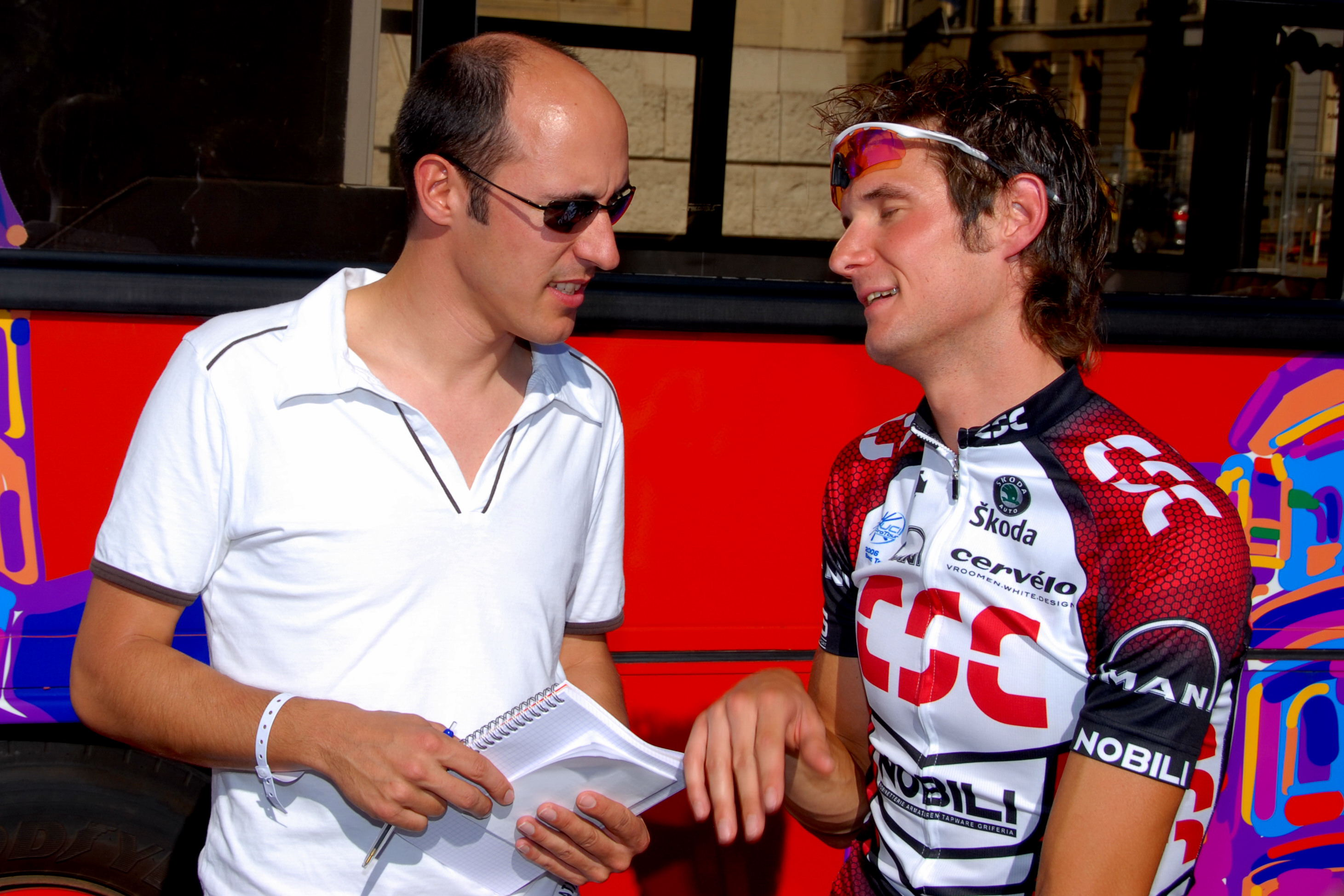 De Marc Vanacker (l.) an de Fränk Schleck (r.) virum "Critérium Tour de France" an der Stad Lëtzebuerg.